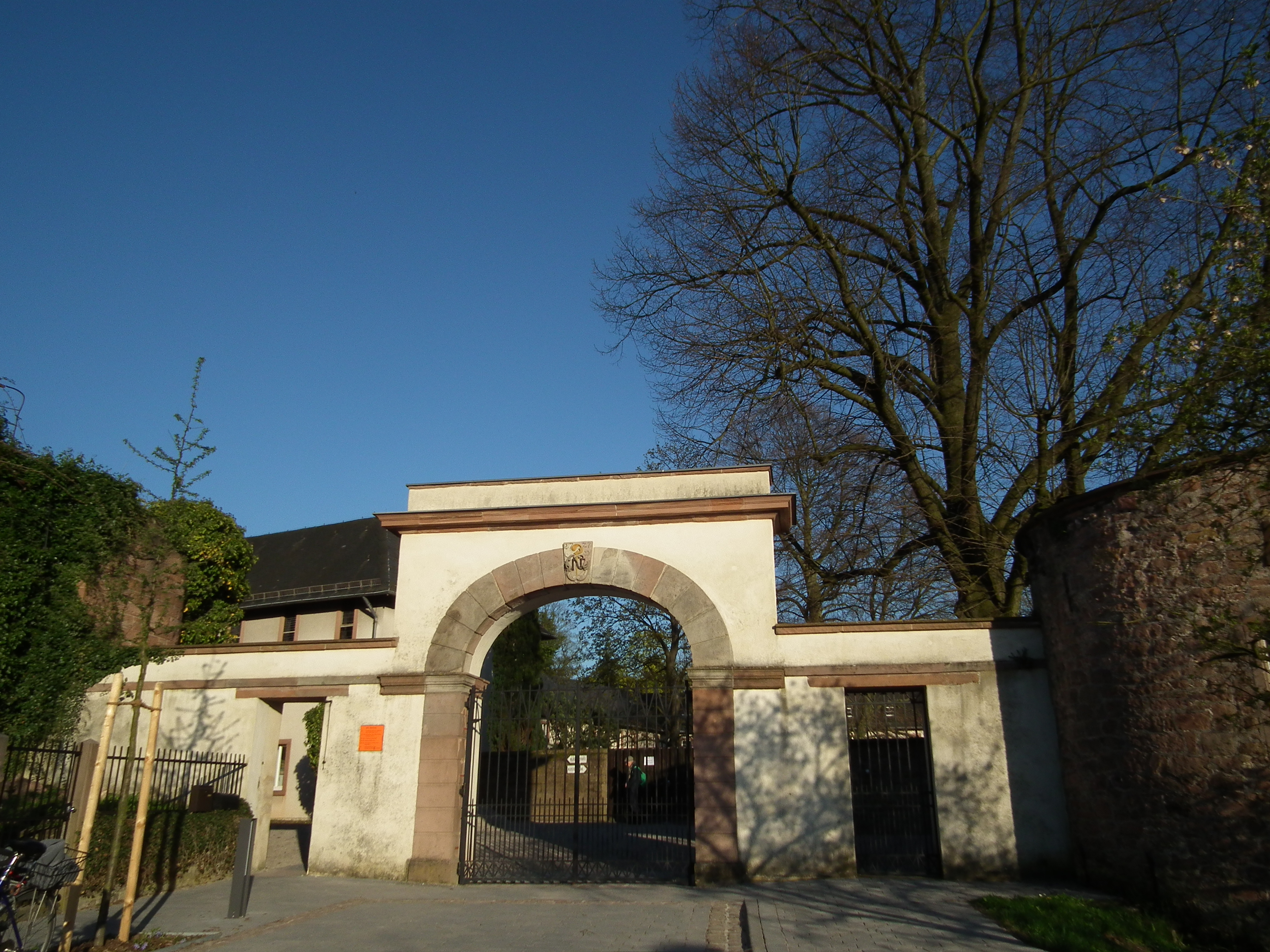 Stift Neuburg im Heidelberger Stadtteil Ziegelhausen (Baden-Württemberg, Deutschland)